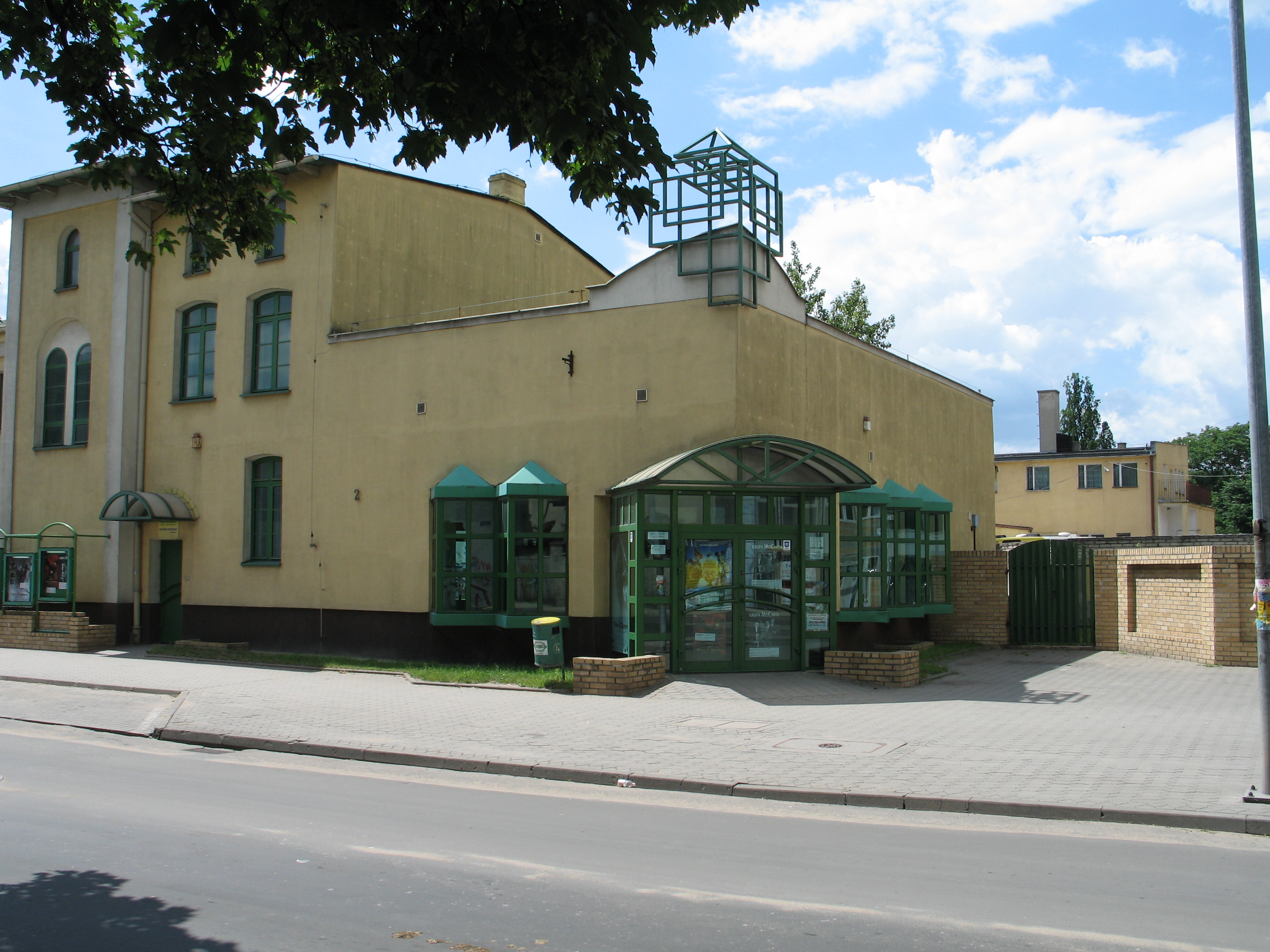 Starogard Gdański, Aleja Jana Pawła II 2 - dawna hala sportowa z XIX w., po 1920 hala Towarzystwa Gimnastycznego „Sokół”, obecnie budynek Kina "Sokół", na piętrze "Archiwum Kociewskie".